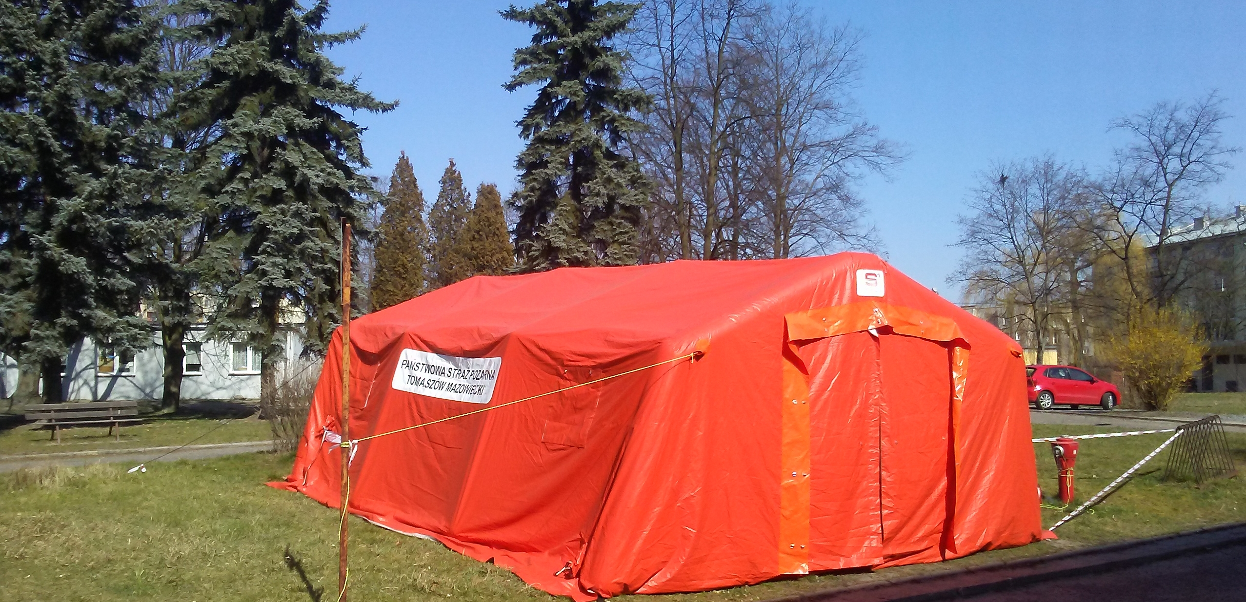 COVID-19 Namiot Państwowej Straży Pożarnej w Tomaszowie Mazowieckim poczas pandemii w marcu 2020 roku